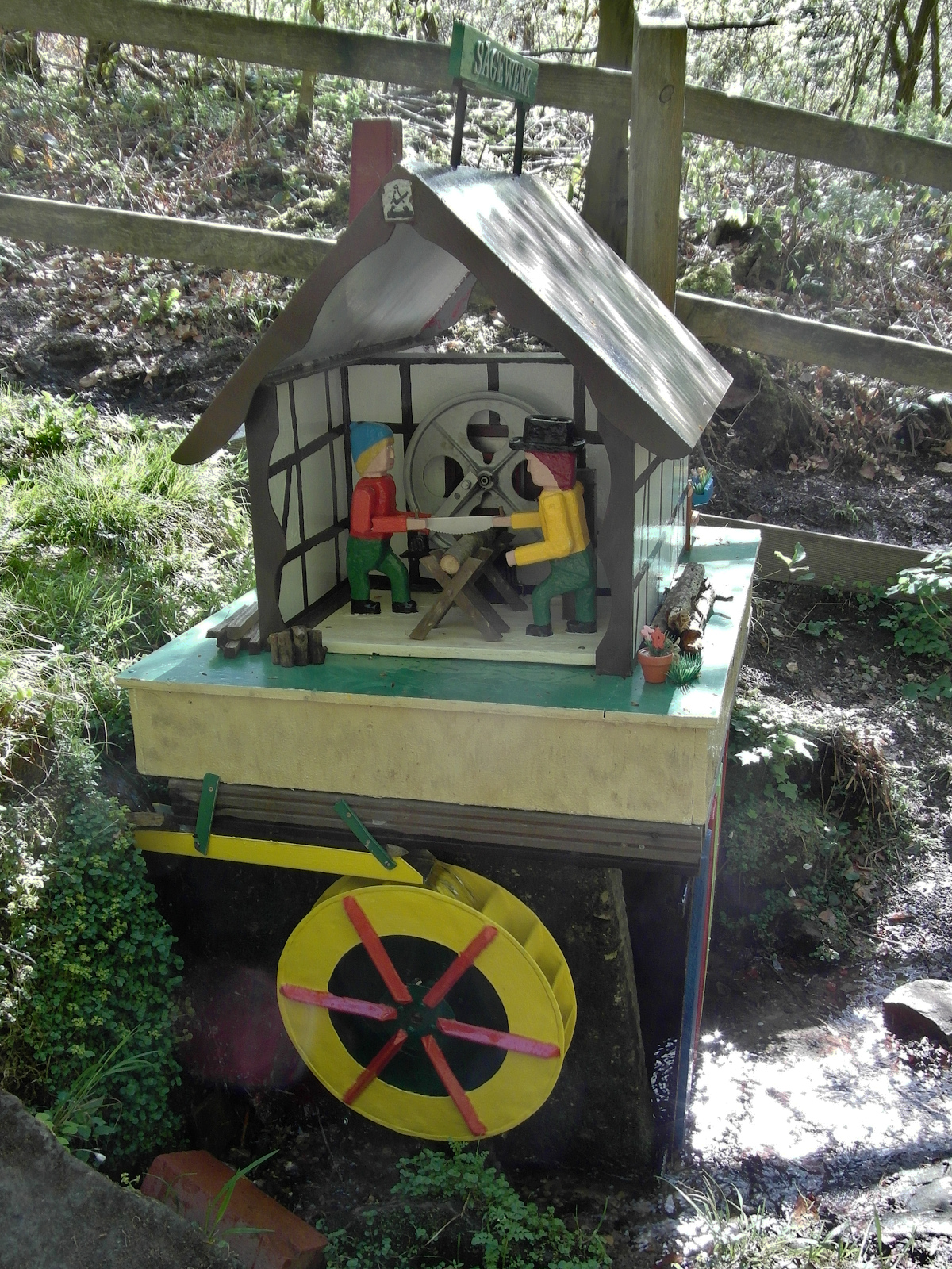 Die Modelle der Wennigser Wasserräder werden jährlich in oft überarbeitetem Design aufgebaut.